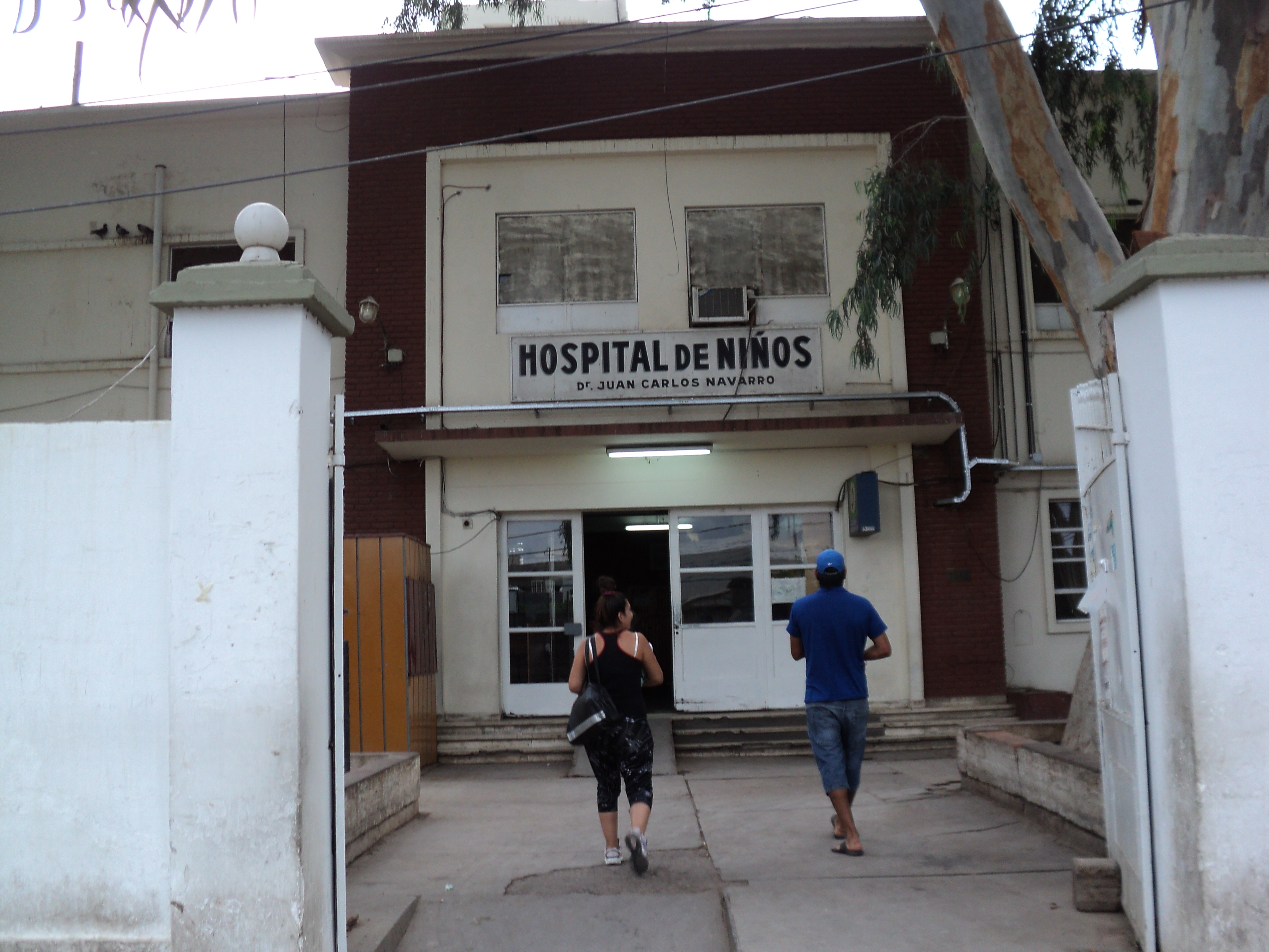 Hospital de niños en el predio del hospital Rawson